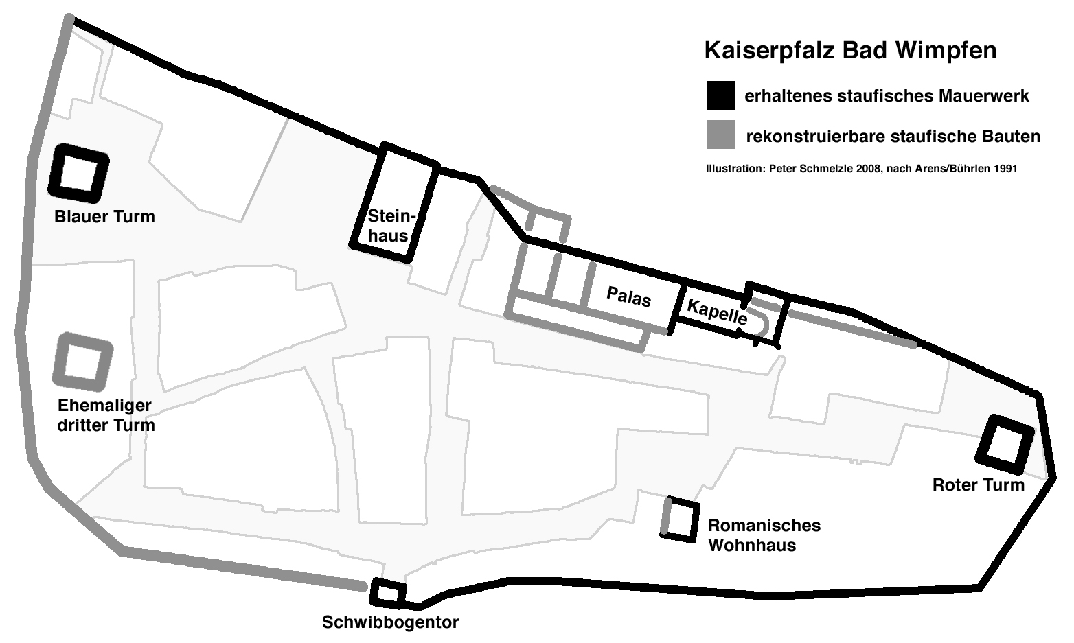 Plan der Kaiserpfalz Wimpfen mit erhaltenen sowie rekonstruierbaren staufischen Gebäuderesten, hinterlegt mit der heutigen städtischen Bausituation